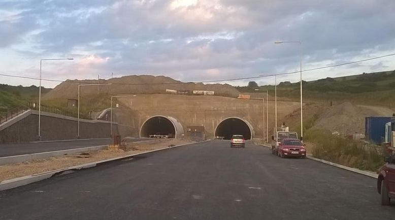 sibenik